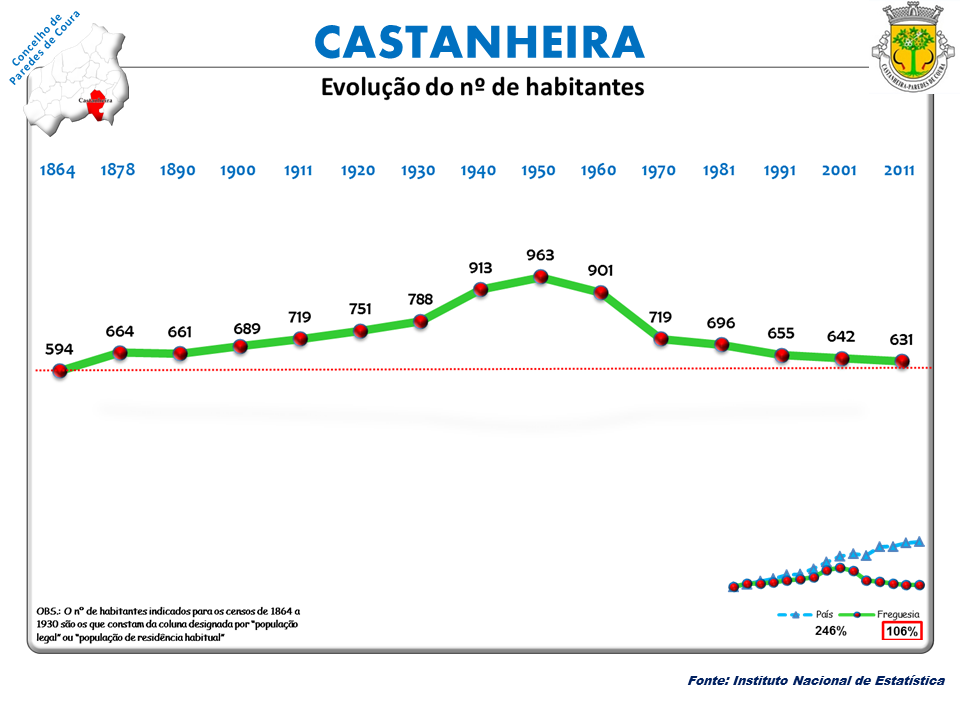 Censos 1864/2011